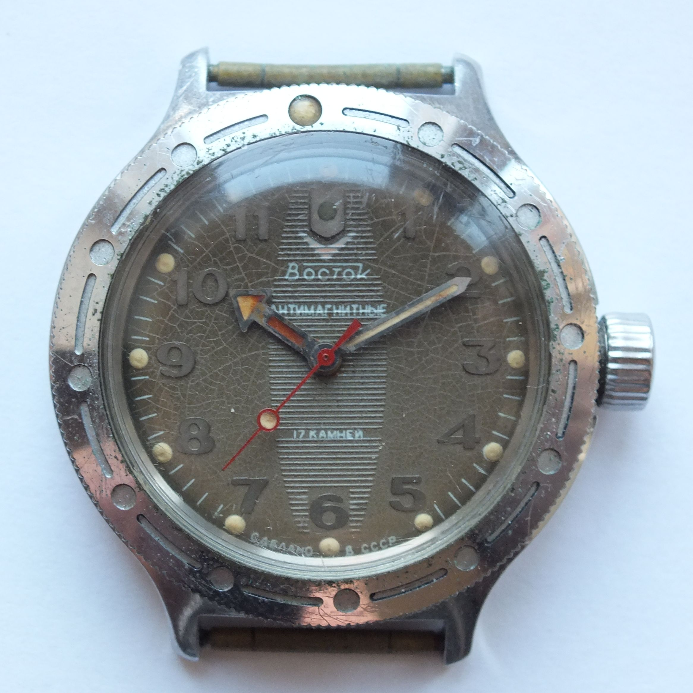 Vostok (watch)